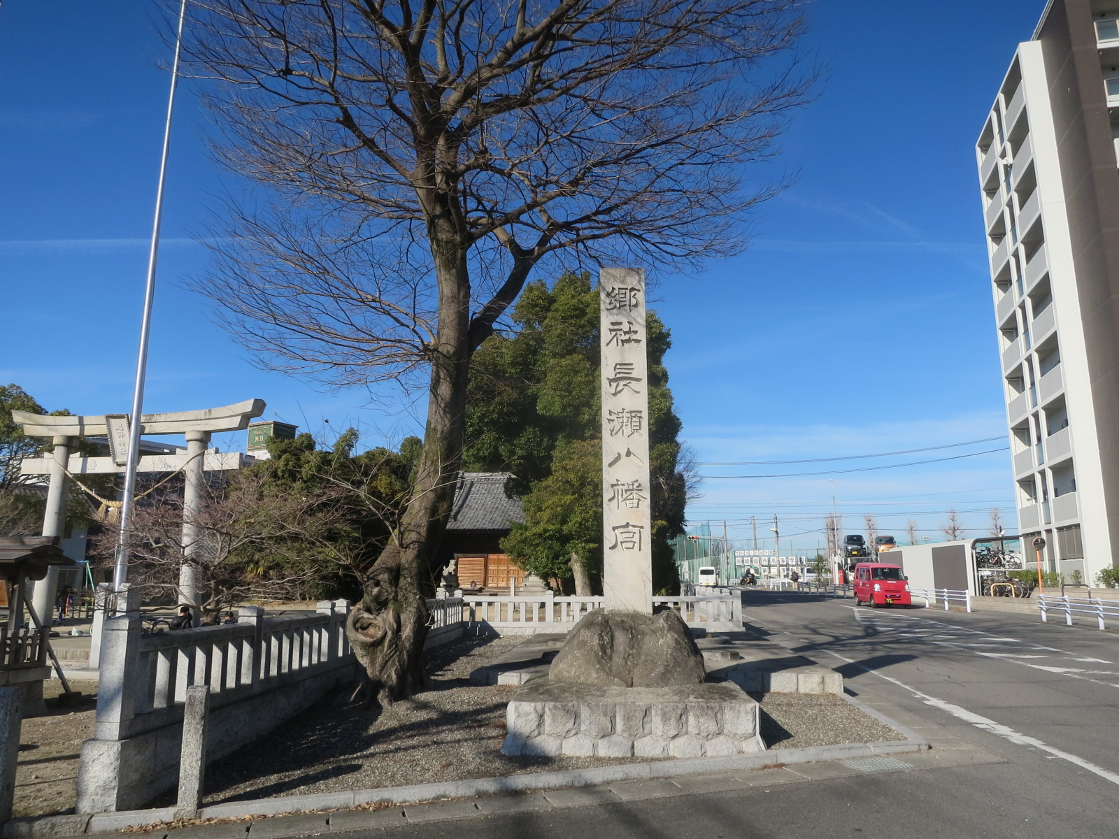 長瀬八幡宮二之鳥居跡（岡崎市舳越町）